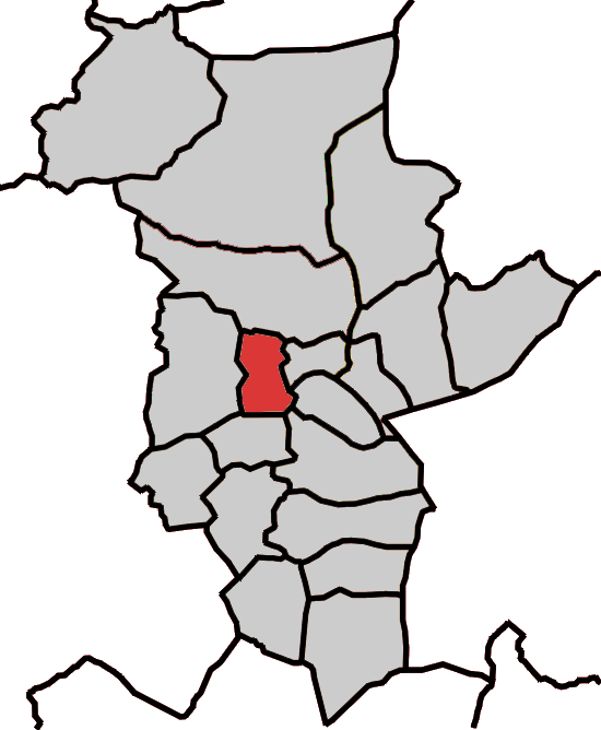 Situación da parroquia de Candia no concello de Abadín